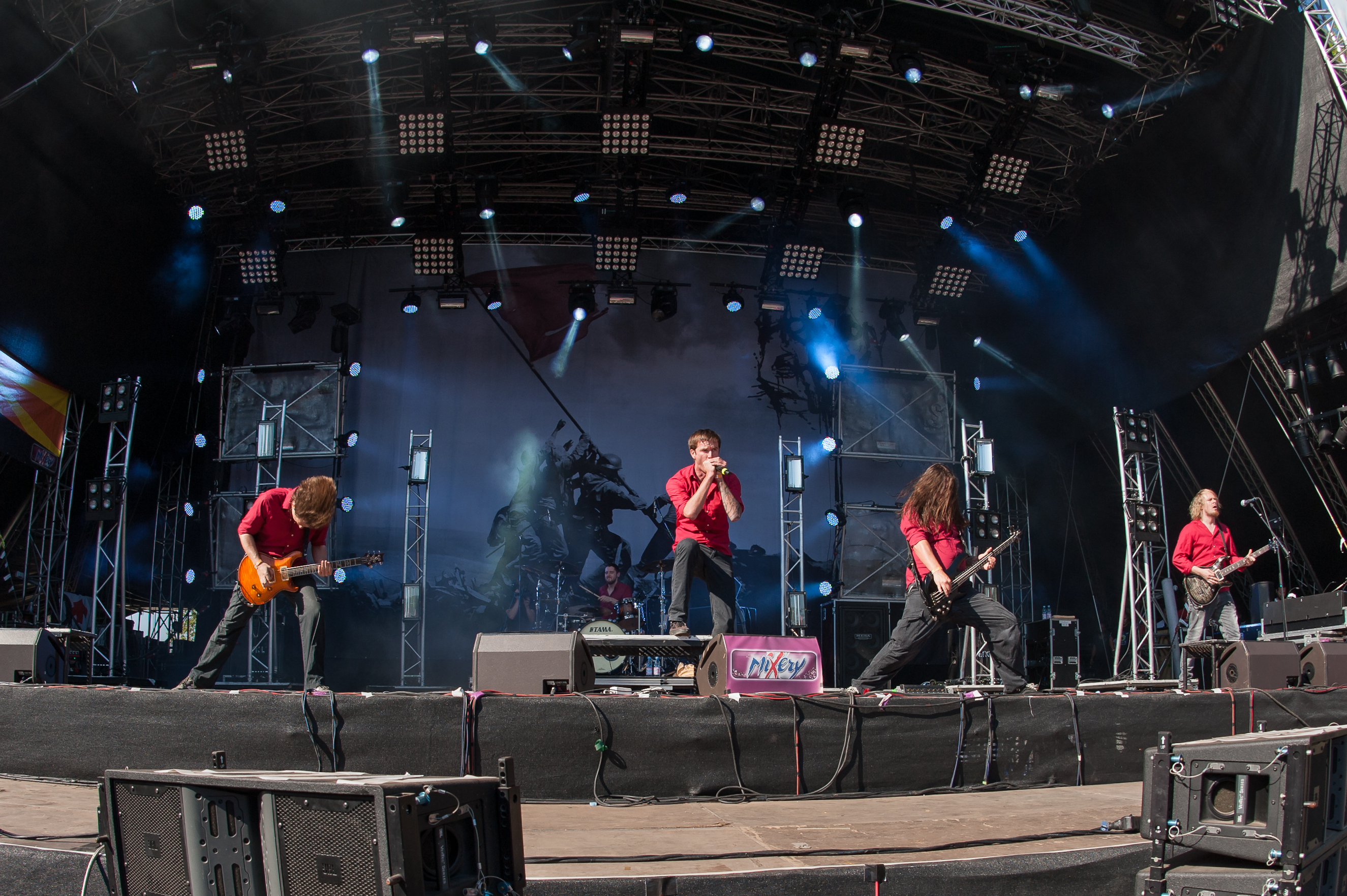 Heaven Shall Burn (deutsche Metalcore-Band) beim Rockfestival Rocco del Schlacko August, 2012. Auf der Bühne, Gesang Marcus Bischoff, E-Gitarre Maik Weichert und Alexander Dietz, E-Bass Eric Bischoff und am Schlagzeug Matthias Voigt.